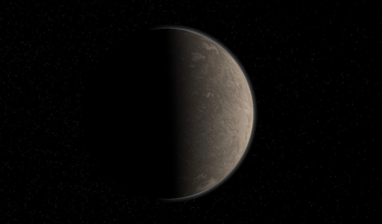 Recreacion de OGLE-2005-BLG-169Lb (13 ME)